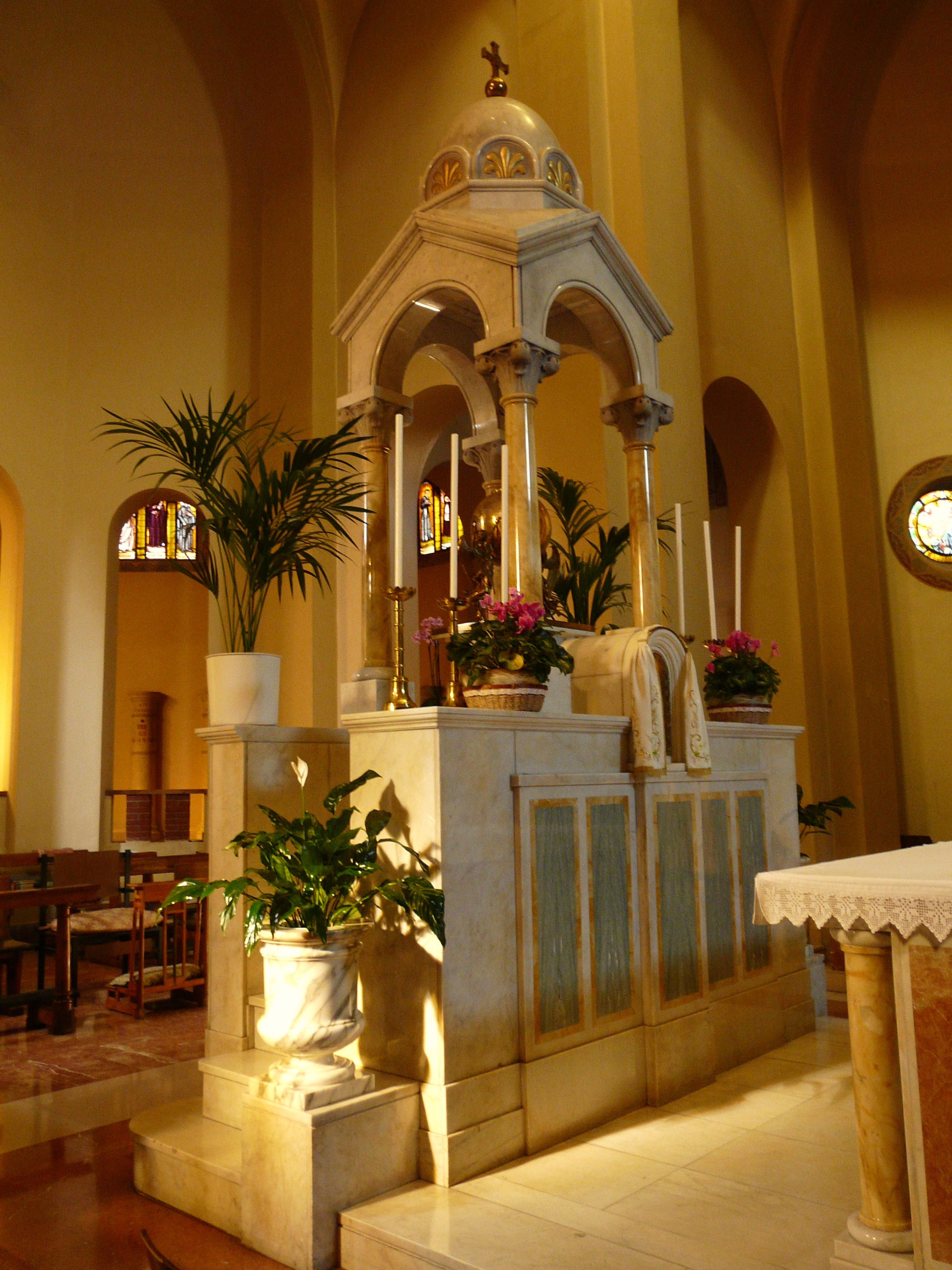 Altare maggiore del santuario-tempio di Cristo Re, Sestri Levante, Liguria, Italia